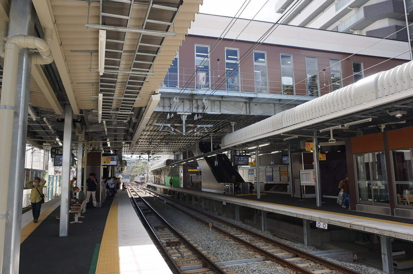 ホーム（橋上駅舎化後） Sony ILCE-6000